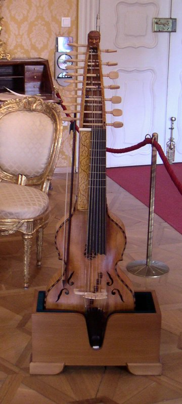 Baryton